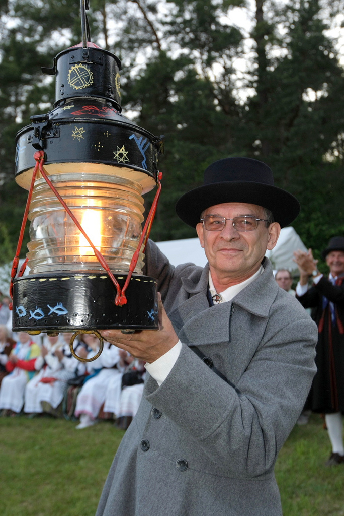 Ülo Luht, rahvatantsujuht.